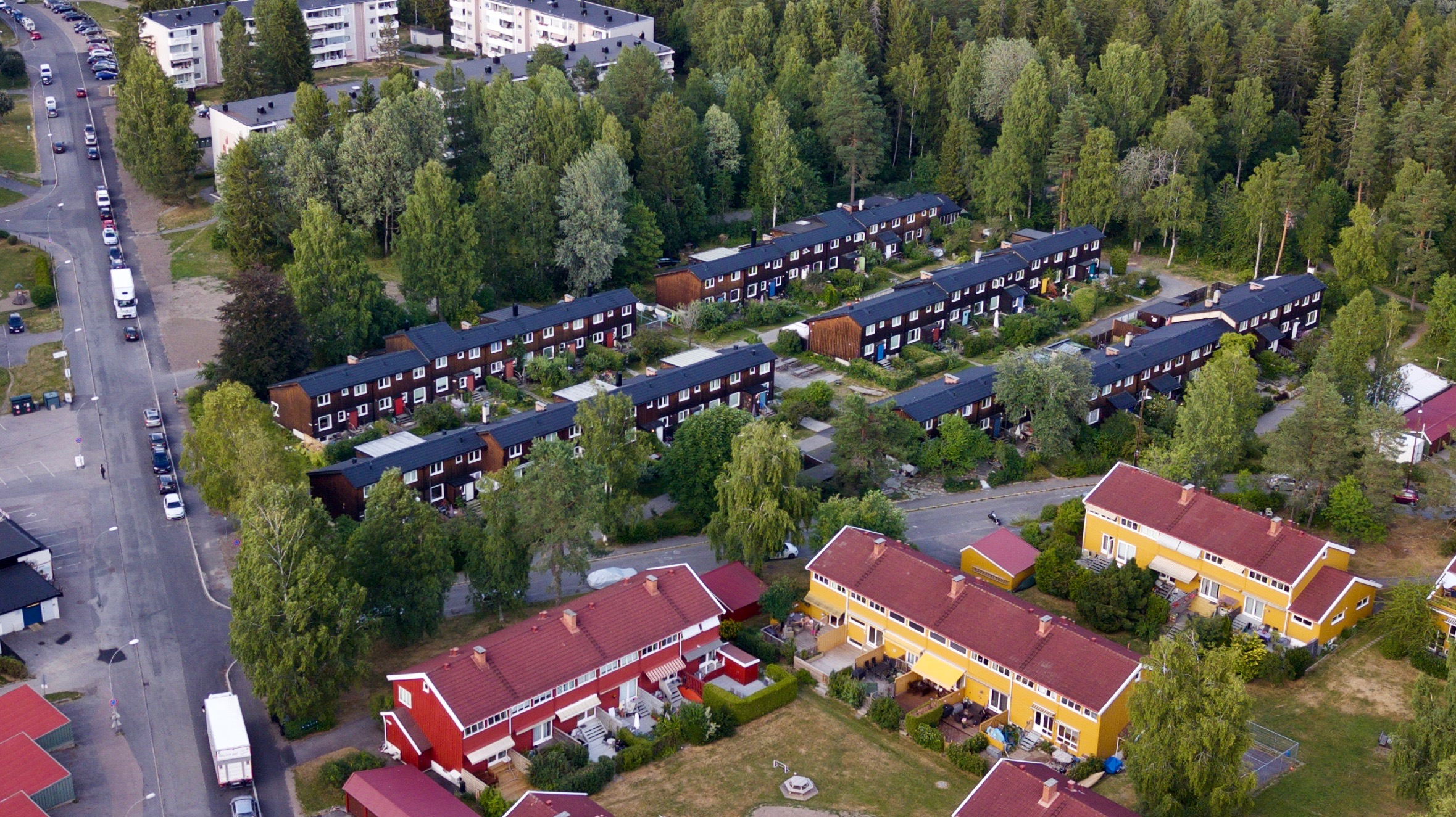 Trolltun Borettslag – kunstnerboligene. Bøler i Oslo.